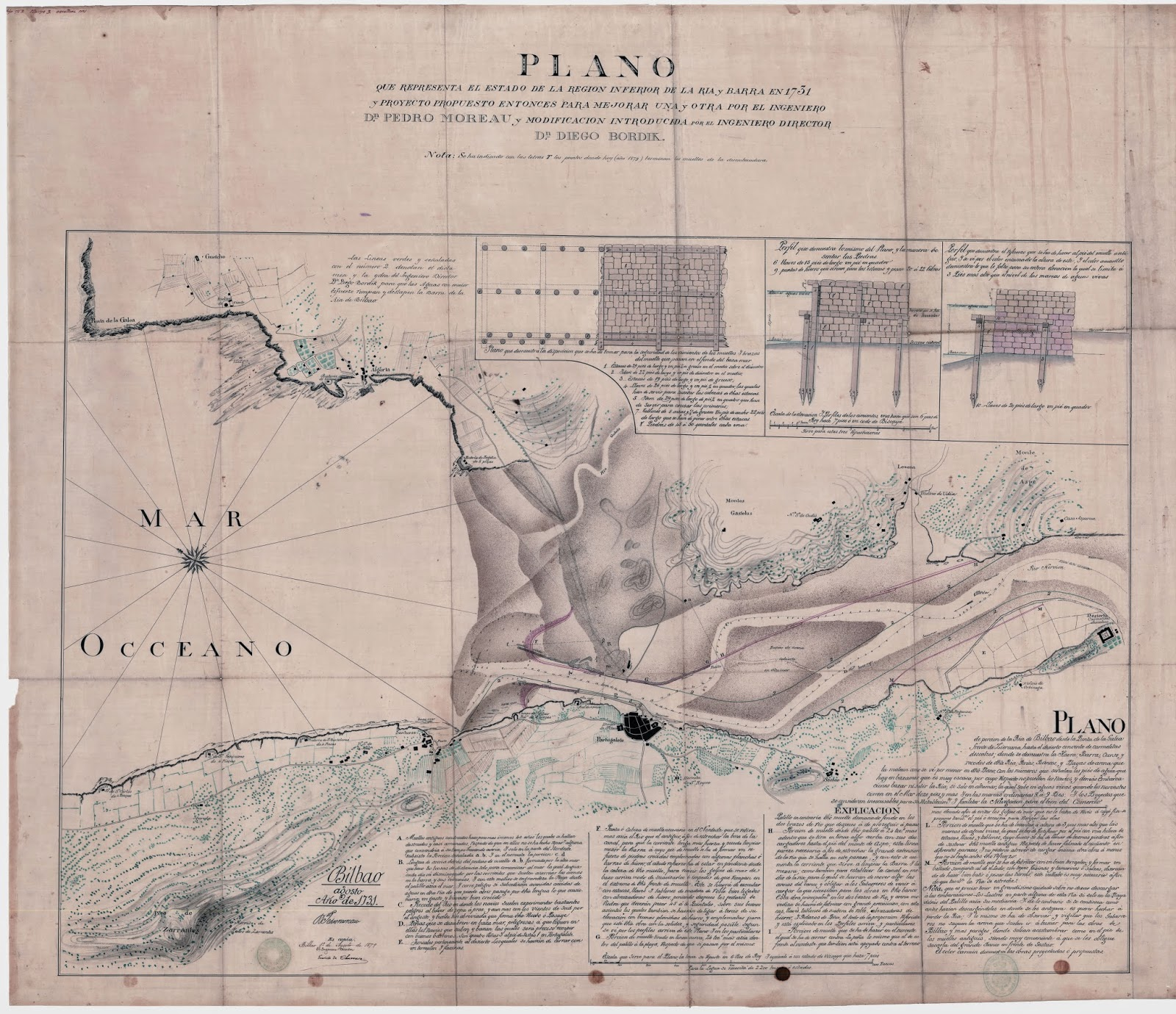 Bilboko itsasadarreren mapa 1731ean. Bertan ikusten da sortzen zen harezko barrak eragiten zituen arazoak konpontzeko egindako proposamena. Garaiotan Areeta harezko gune bat zen, eta Gobela ibaiak bertan isurtzen zituen urak.